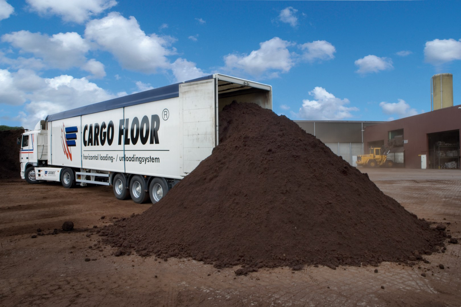 Oplegger met schuifvloersysteem, lading potgrond